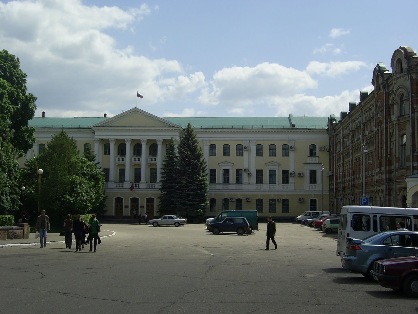 Брянск, площадь Карла Маркса 2 (Красная пл.). Брянская областная Дума. Здание Брянской областной Думы (архитектор Б. П. Шавырин, 1955) Величественное трёхэтажное здание в стиле ретроспективной классики, изначально проектировавшееся для Брянского обкома КПСС. Здание Г-образной формы (крыло с залом заседаний выходит во двор) украшено двумя колонными портиками (со стороны площади и со стороны бульвара Гагарина), увенчанными треугольными фронтонами. Декоративная лепнина со стороны двора сохраняет изображения советской символики. После приостановки деятельности КПСС в 1991 году, это здание использовалось для размещения Брянской товарно-фондовой биржи; с 1994 года занято Брянской областной Думой. До Великой Отечественной войны на месте нынешней областной думы располагалось здание Орловского Коммерческого банка.